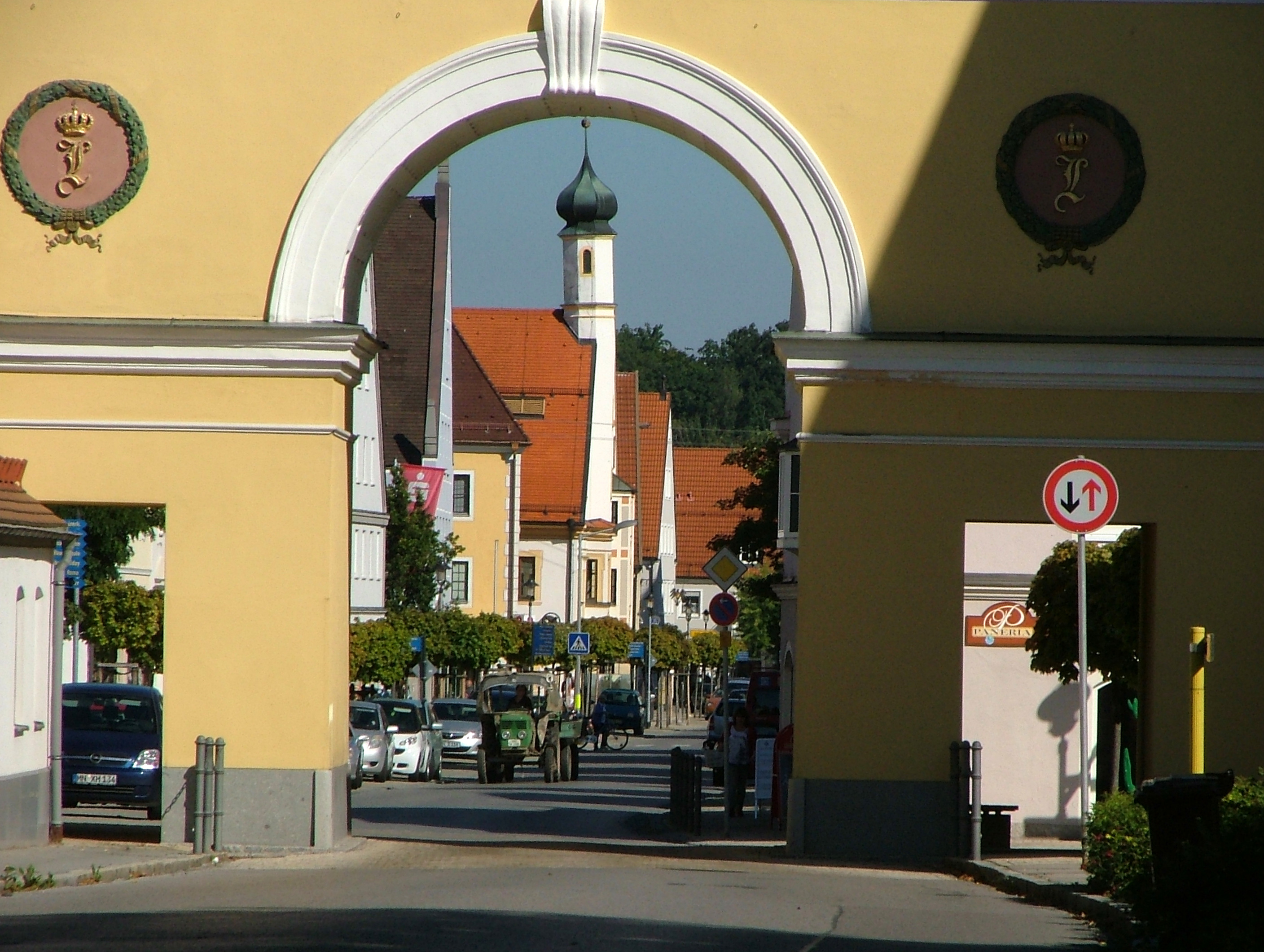 Stadttor